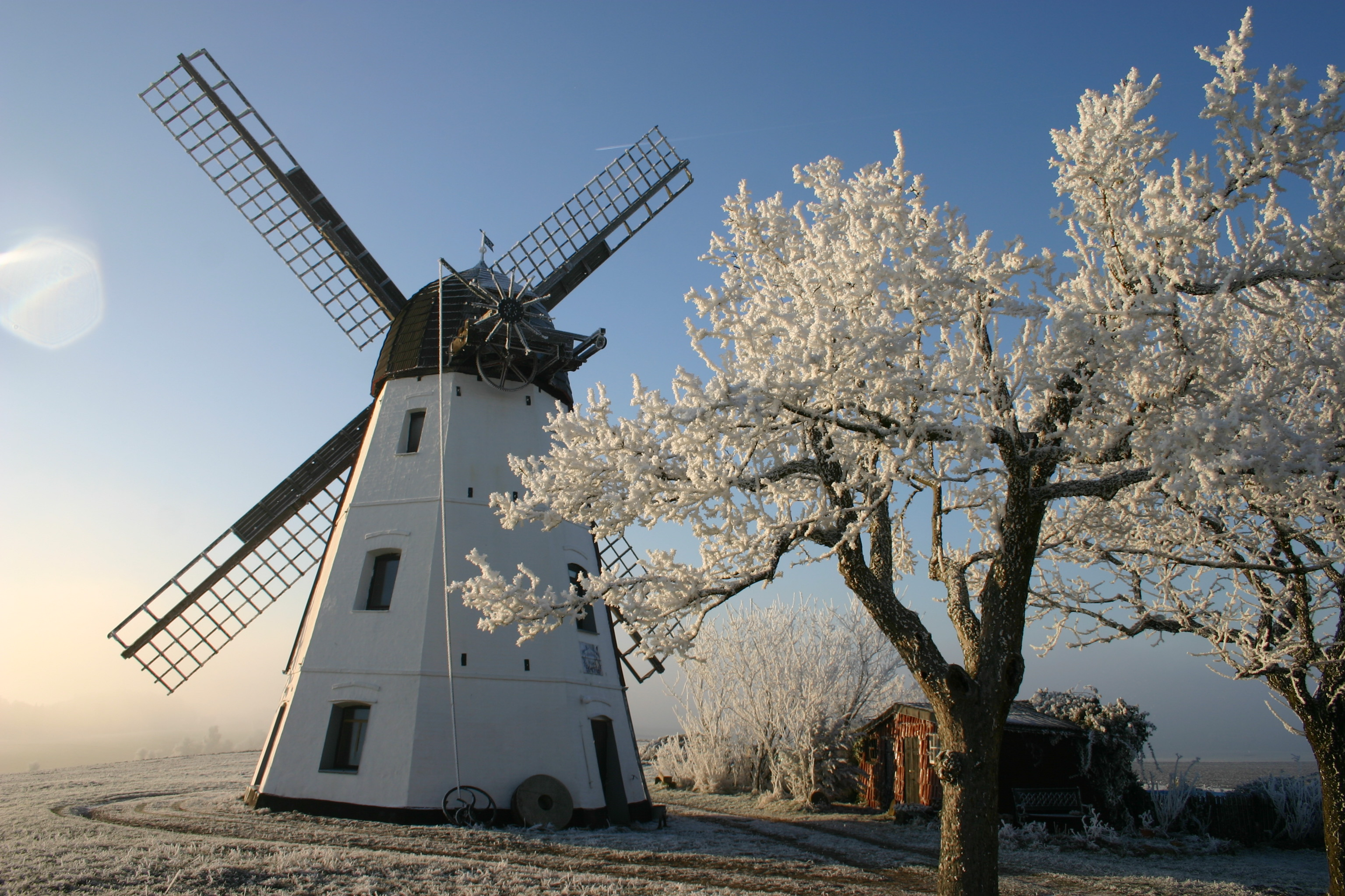 Hollaender Muehle Hedeper Germany